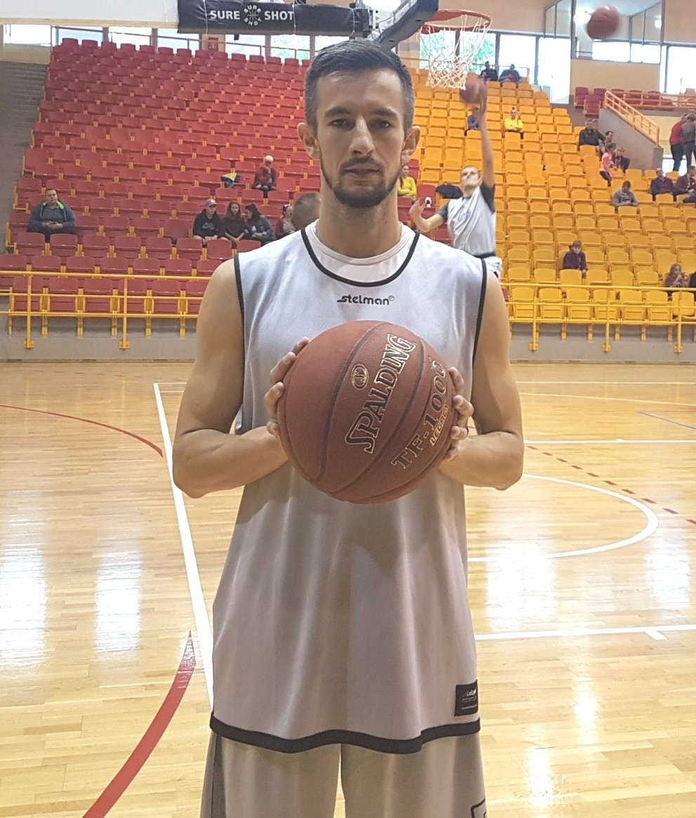 Konrad Koziorowicz, Spójnia Stargard